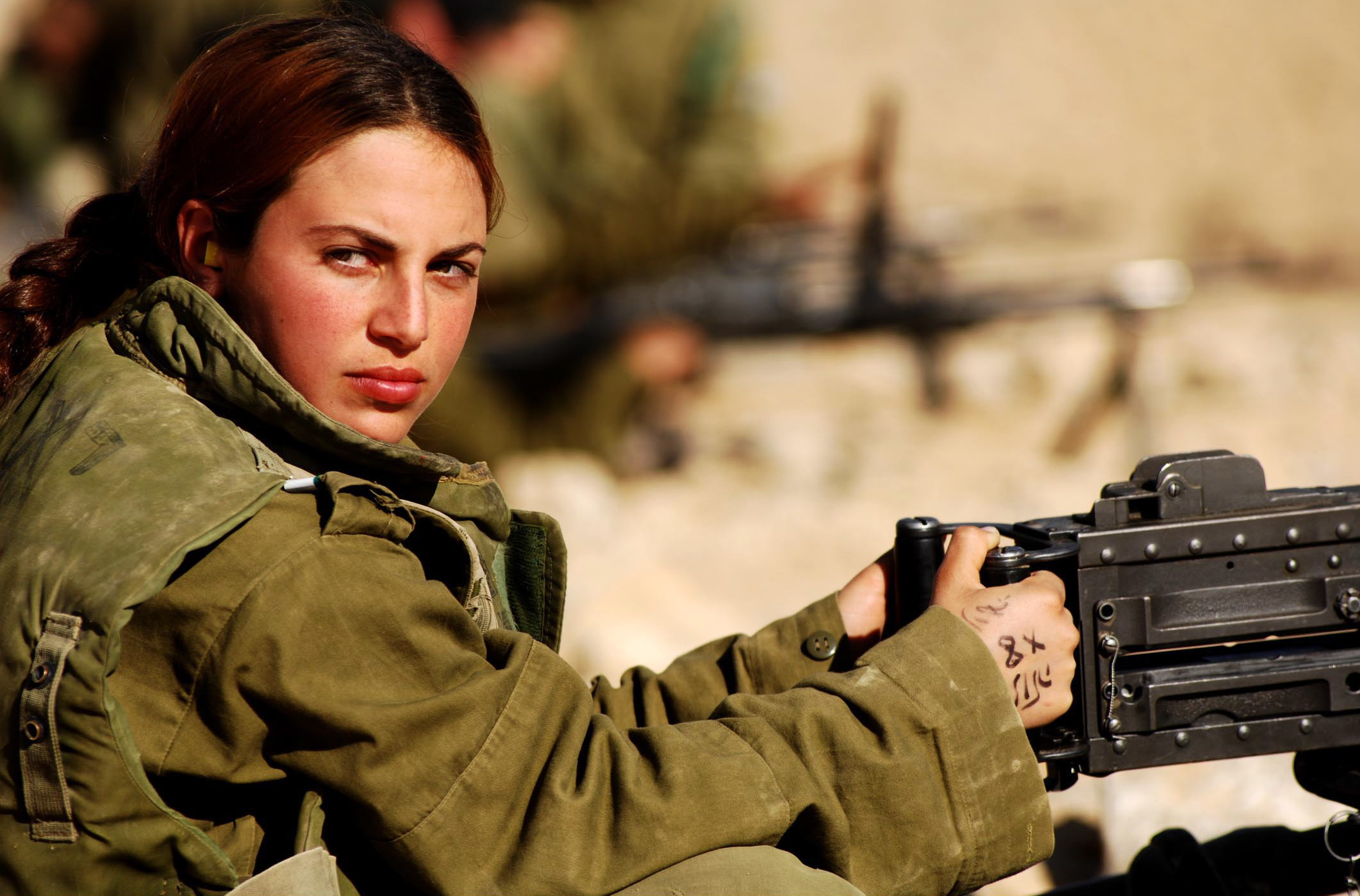 December 5, 2006. The Field Training Week in Southern Israel, part of the IDF Infantry Instructors course, includes individual and group drills, navigation practice, sleeping in the field and camouflage training. At the end of the course the female soldiers will be placed in different positions, instructing IDF Ground Forces. * שבוע אימוני שדה הדרום הארץ מהווה חלק מקורס מדריכות חי"ר, וכולל תרגילי יחיד וקבוצה, אימוני ניווט, שינה והסוואה בשטח ועוד. בסוף הקורס מוצבות בתפקידים שונים כמדריכות בזרוע היבשה.